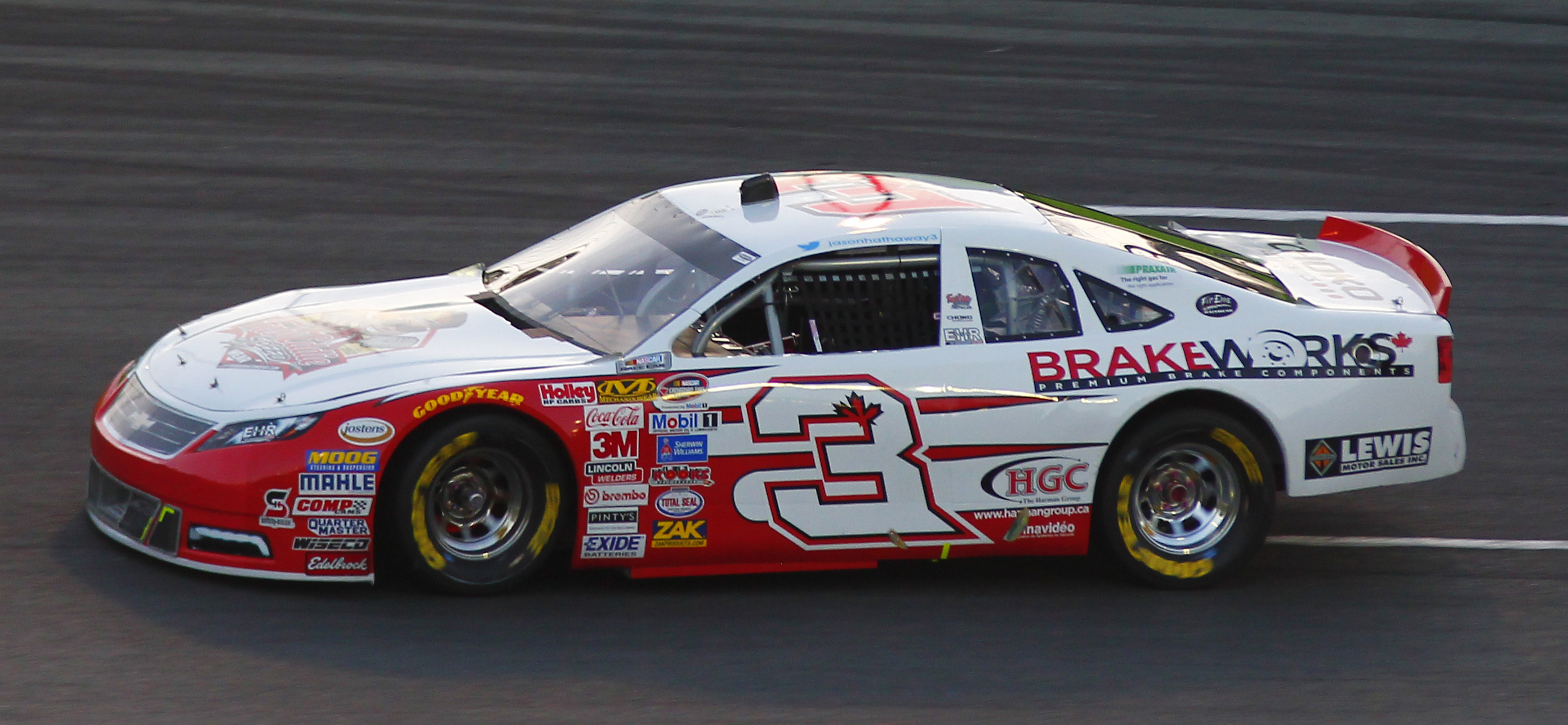 Jason Hathaway - Nascar Canadian Tire Series - Autodrome Chaudière - 13 juin 2015 (photo Paul-Émile Poulin-Jacques)